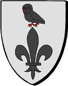 Koedanlem